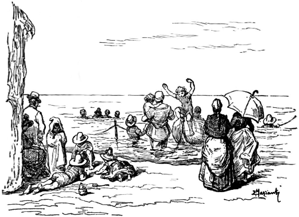 Illustrazione da I bambini delle diverse nazioni di Emma Perodi, Firenze, 1890